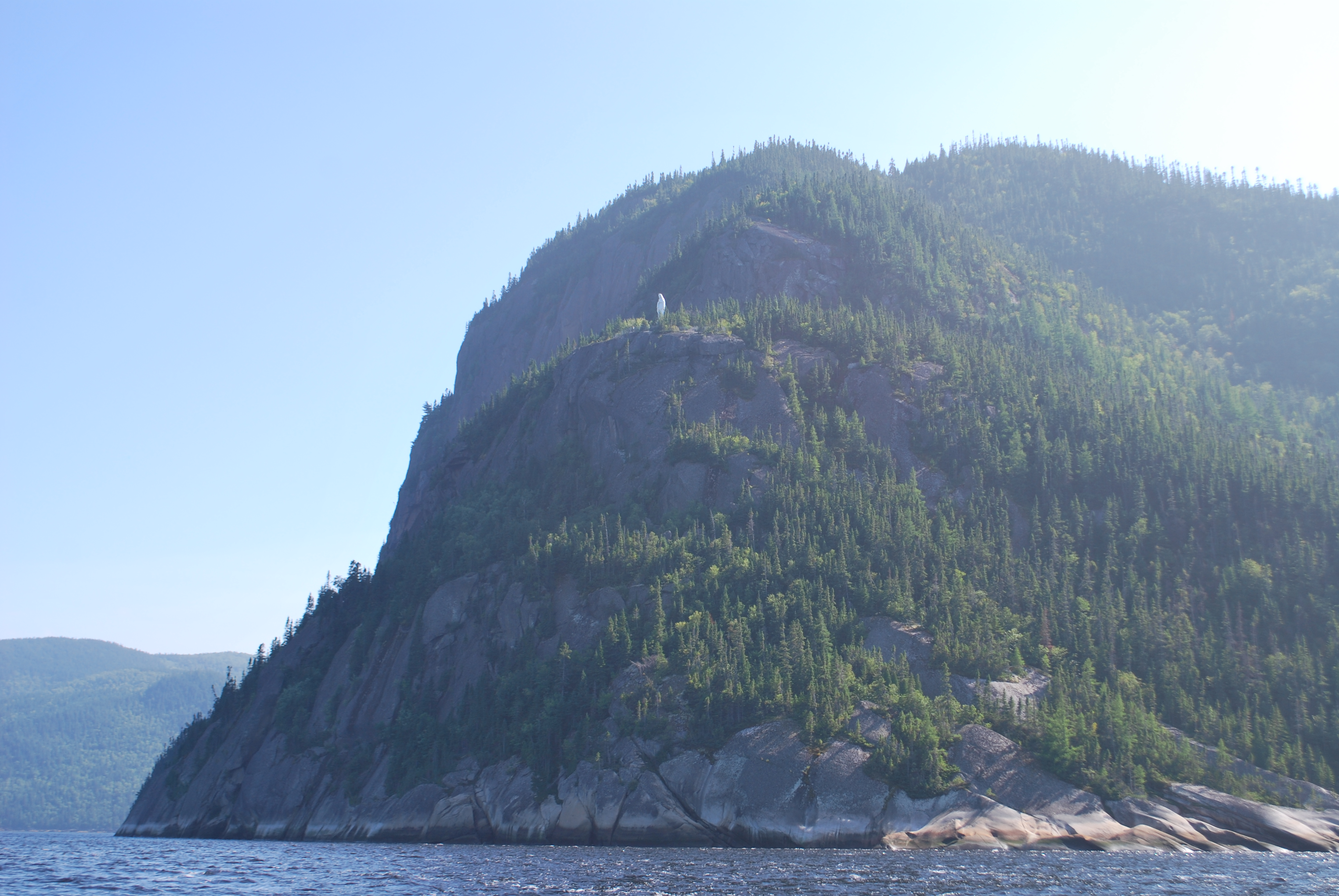 Cap Trinité et Notre-Dame-du-Saguenay.